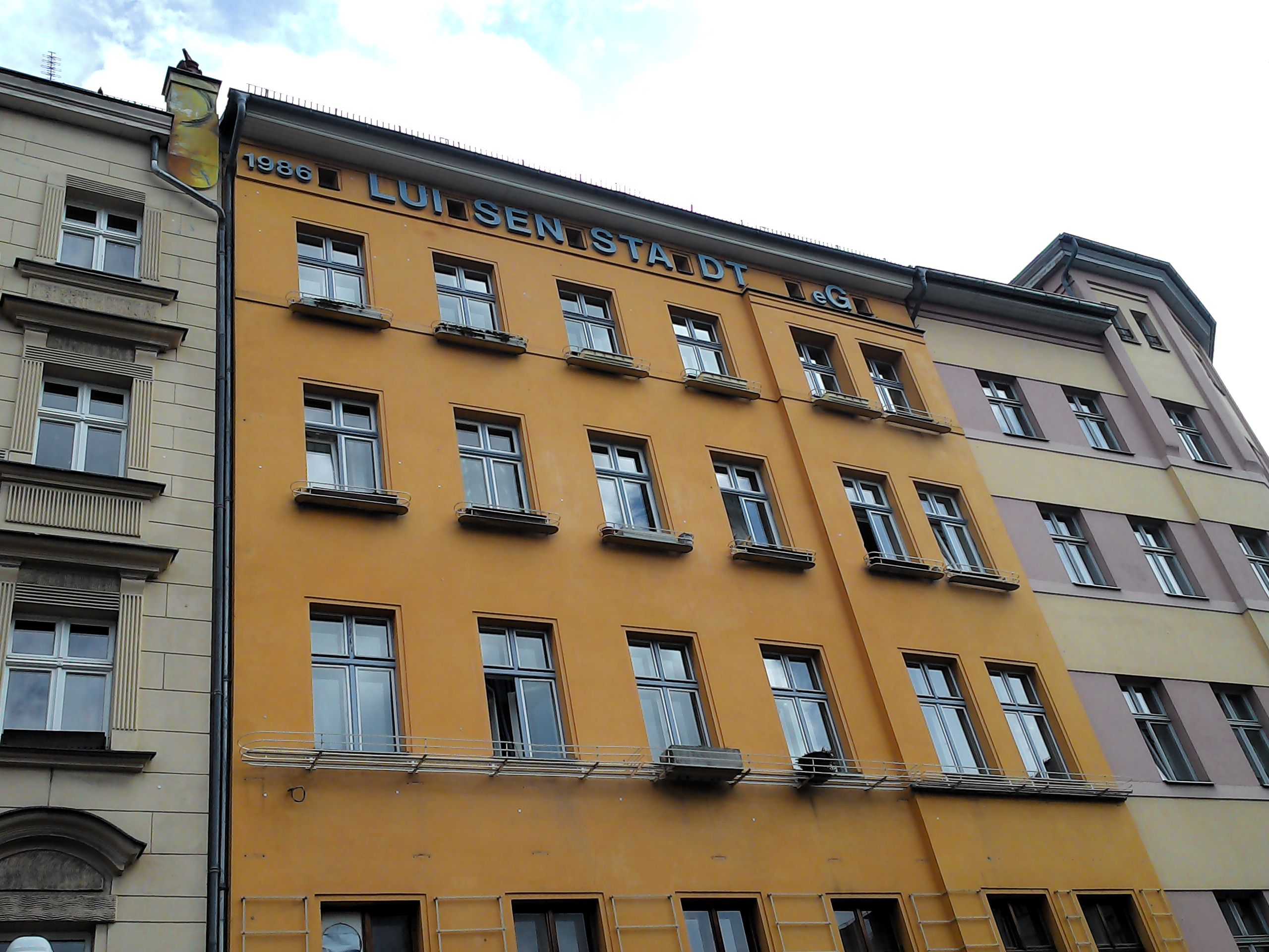 Berlin Heinrichplatz. Sitz der 1986 von ehemals besetzten Häusern gegründeten Genossenschaft Luisenstadt eG in Berlin-Kreuzberg.